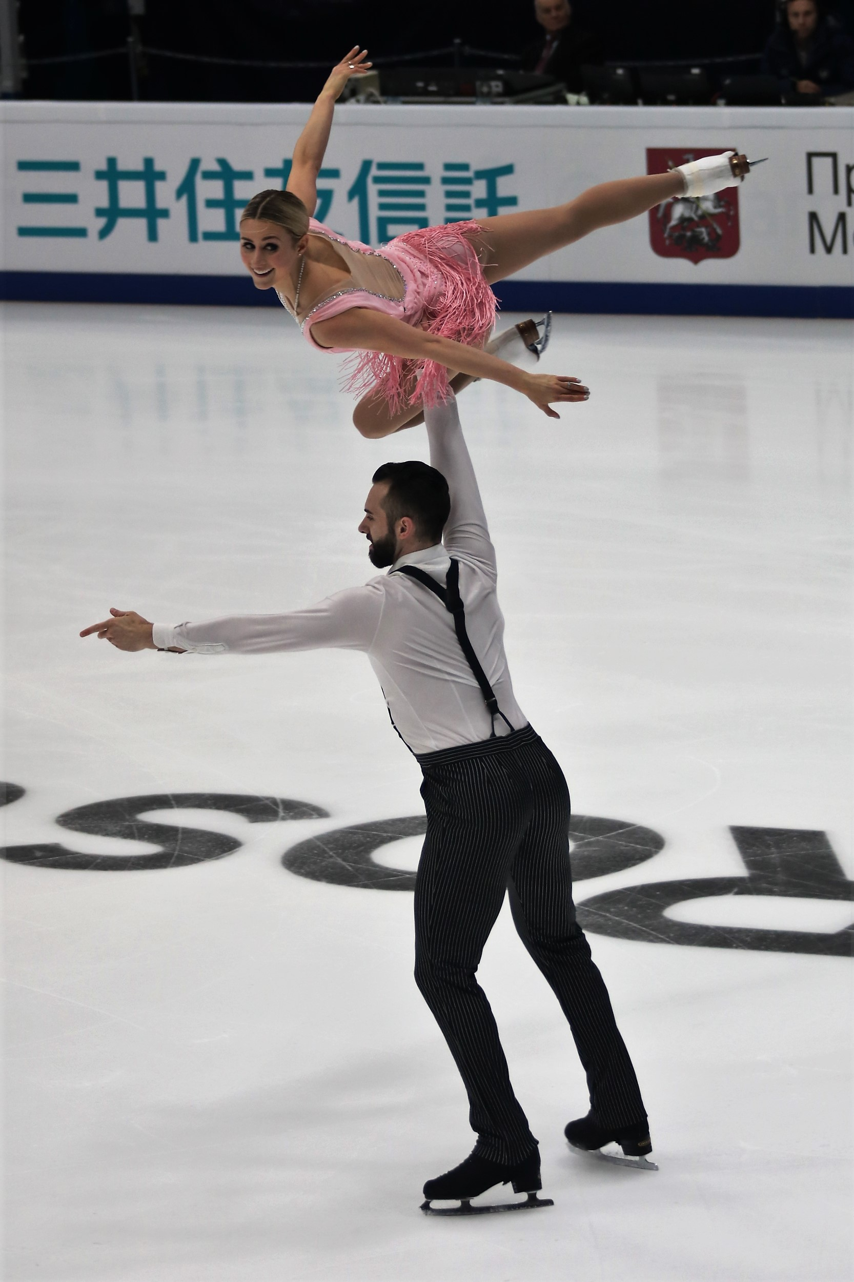 Эшли Кейн / Тимоти Ледук (США) на Rostelecom Cup 2018